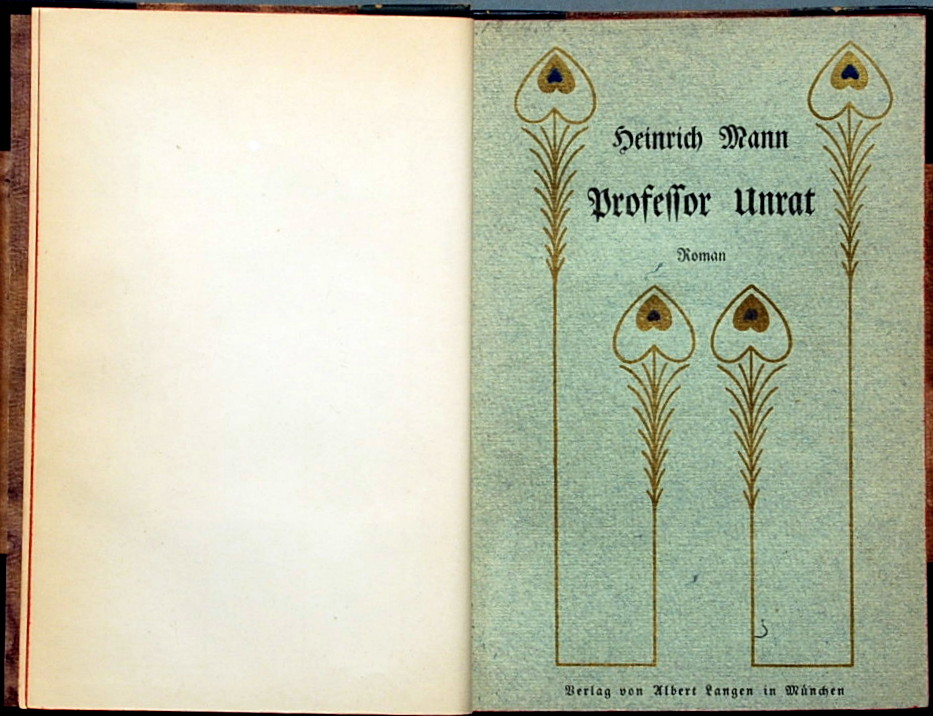 Heinrich Mann: Professor Unrat oder Das Ende eines Tyrannen. Roman München: A. Langen 1905, Deckblatt der Original-Broschur + Vortitel + 1 Seite Verlagsanzeigen + Titel + 279 Seiten + 1 leere Seite + 4 Seiten Verlagsanzeigen; Bibliographie: Wilpert/Gühring² 14; Brockhaus 21. Aufl. (2006) Band 17, Seite 615.